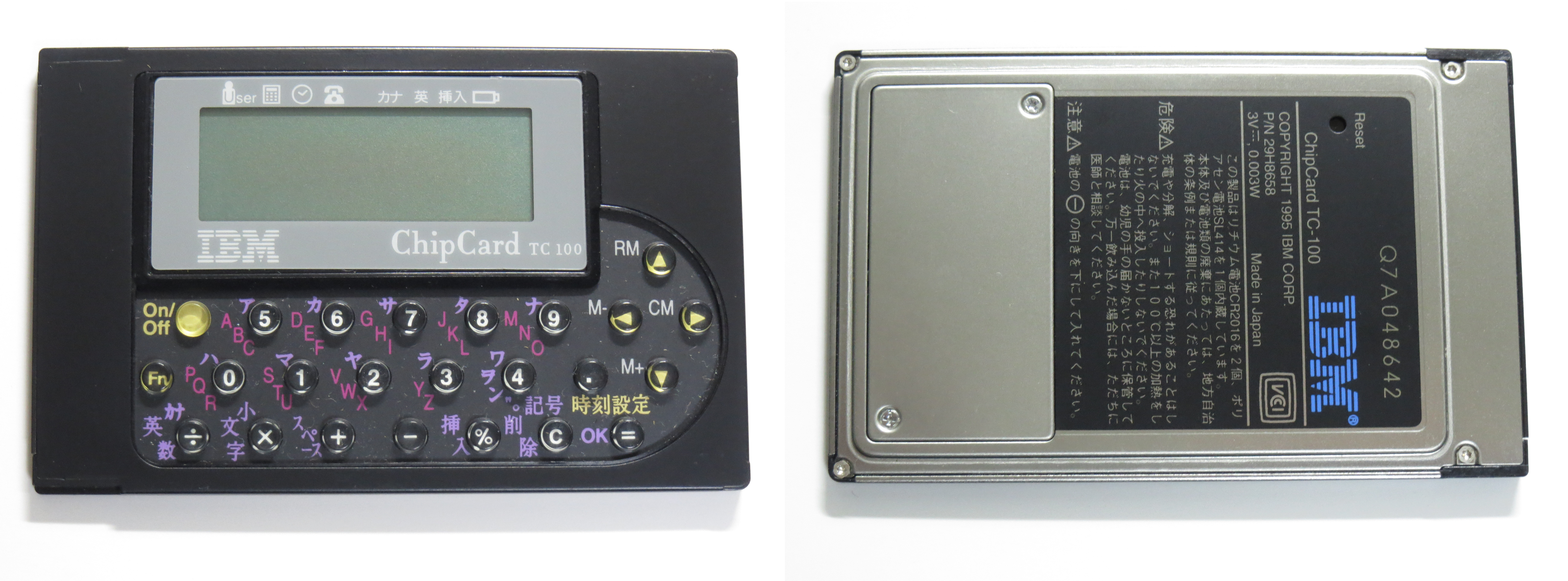 IBM ChipCard TC-100 1995年発売